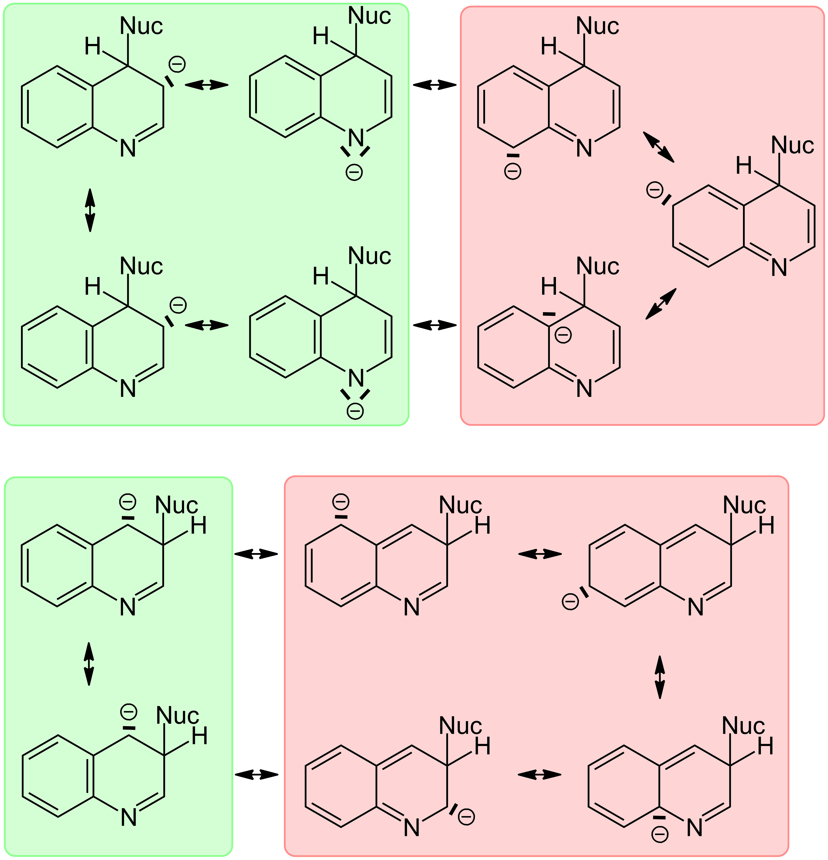 Mesomere Grenzstruktuzren der nukleophilen Substitution an Chinolin in 3- und 4-Position